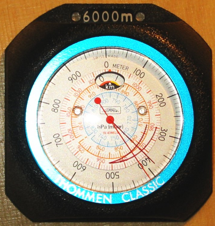 Thommen Classic Höhenmesser bis 6000 Meter. Aufnahmedatum: 22. Juli 2005